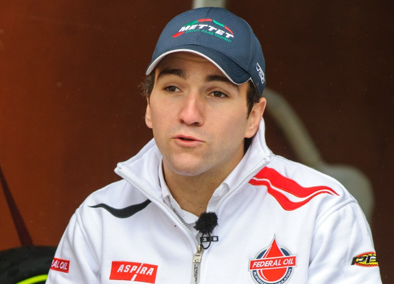 Xavier Simeon - Circuit Mettet Nov 2013